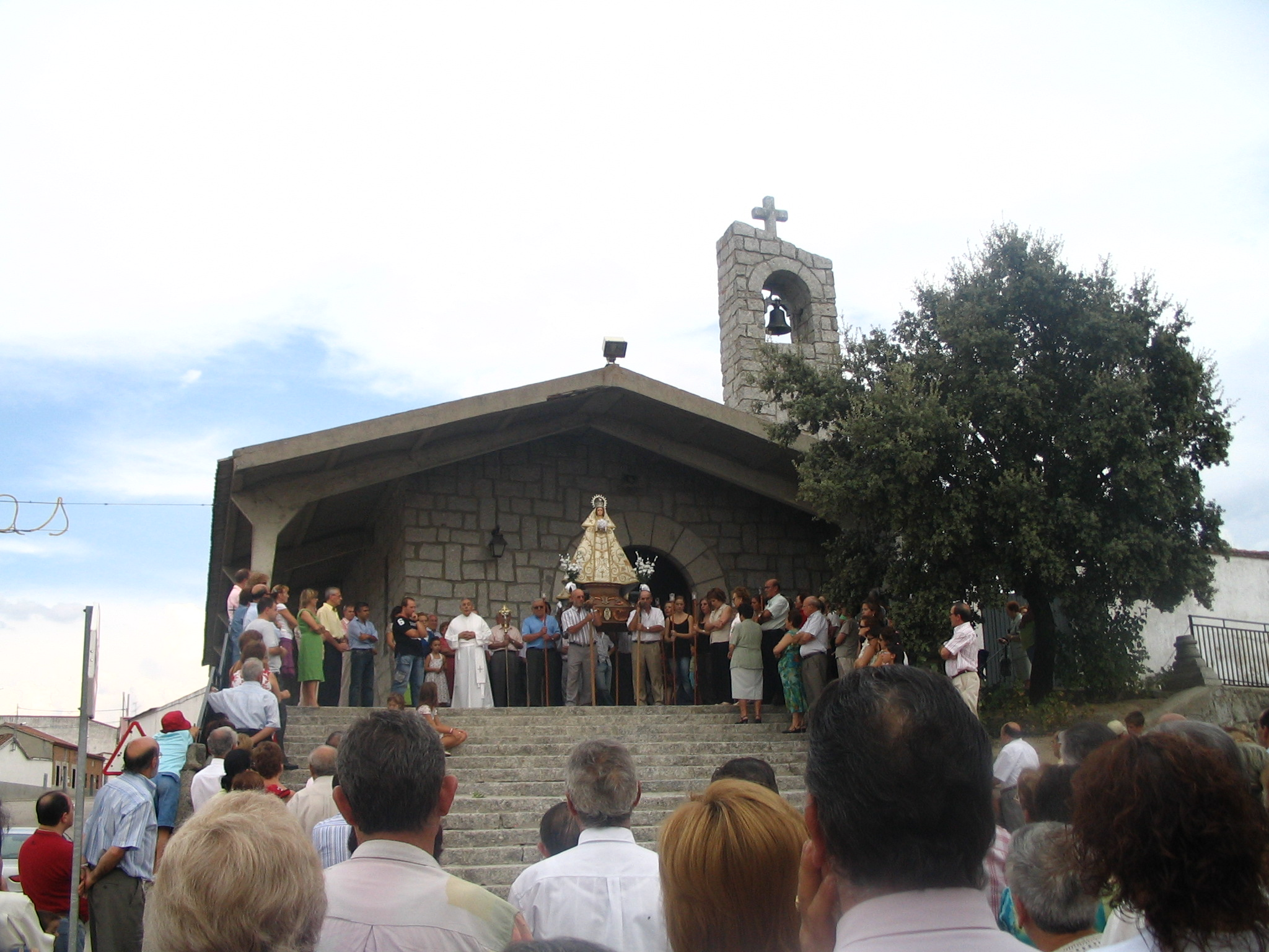 Rezo de la salve a la Virgen de la Encina (8-9-06). Macotera